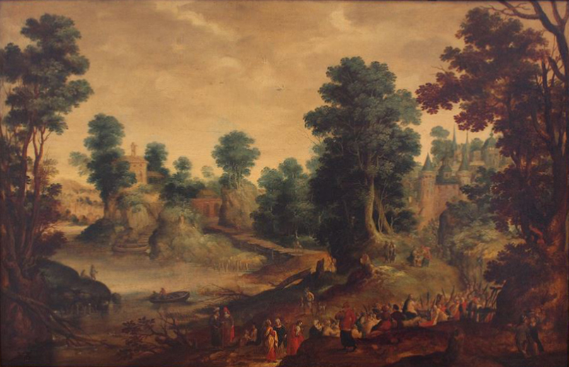 Christ's entering in Jerusalem